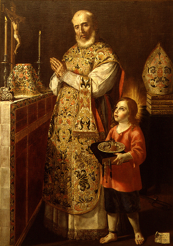 La obra representa al religioso mercedario San Pedro Pascual celebrando la eucaristía.